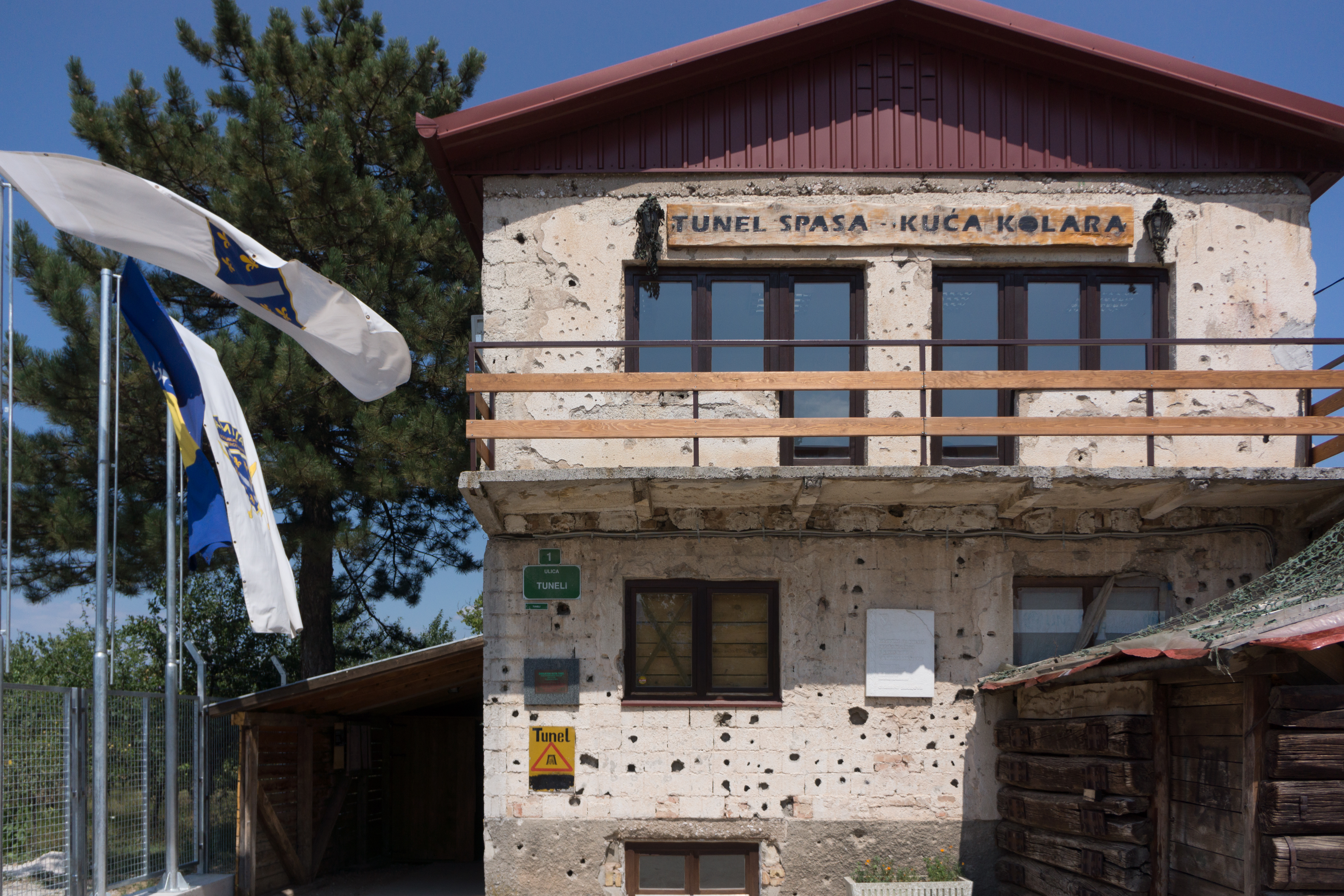 Tunnel de Sarajevo. Maison de la famille Komar.